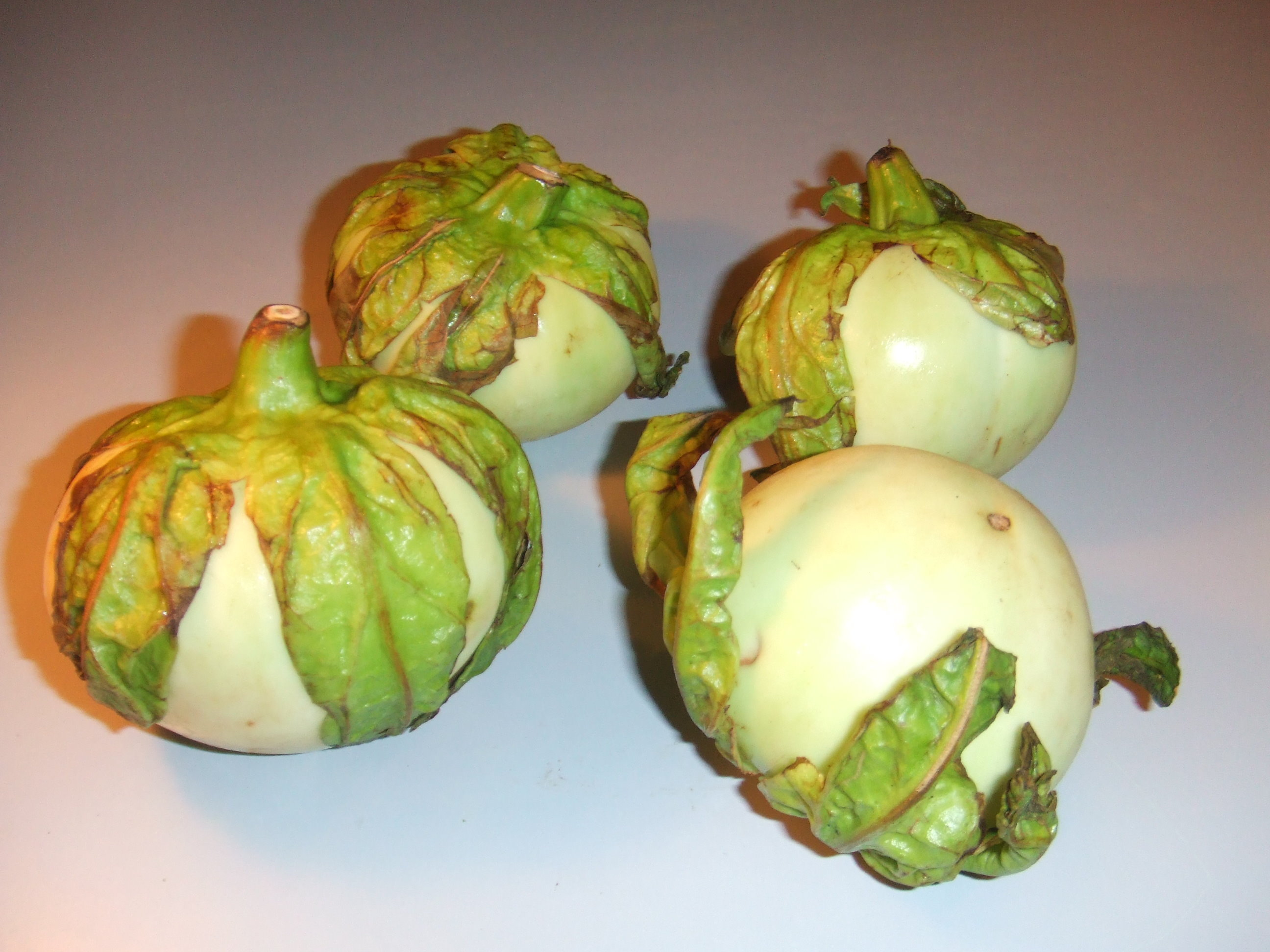 Antroewa gekocht op de Binnenrotte markt in Rotterdam